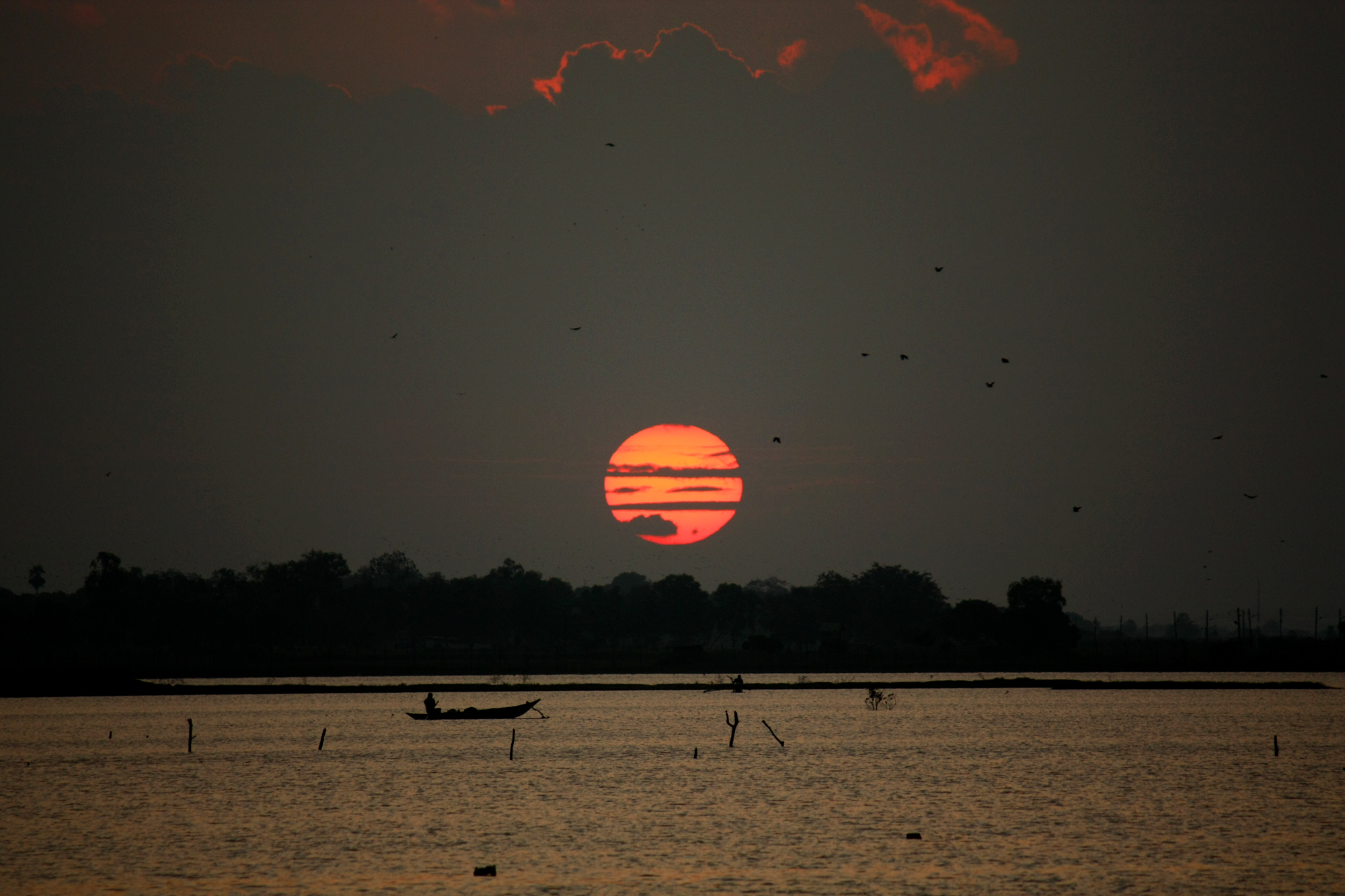 சூரிய அஸ்தமனம் - மட்டக்களப்பு புதிய பாலம்